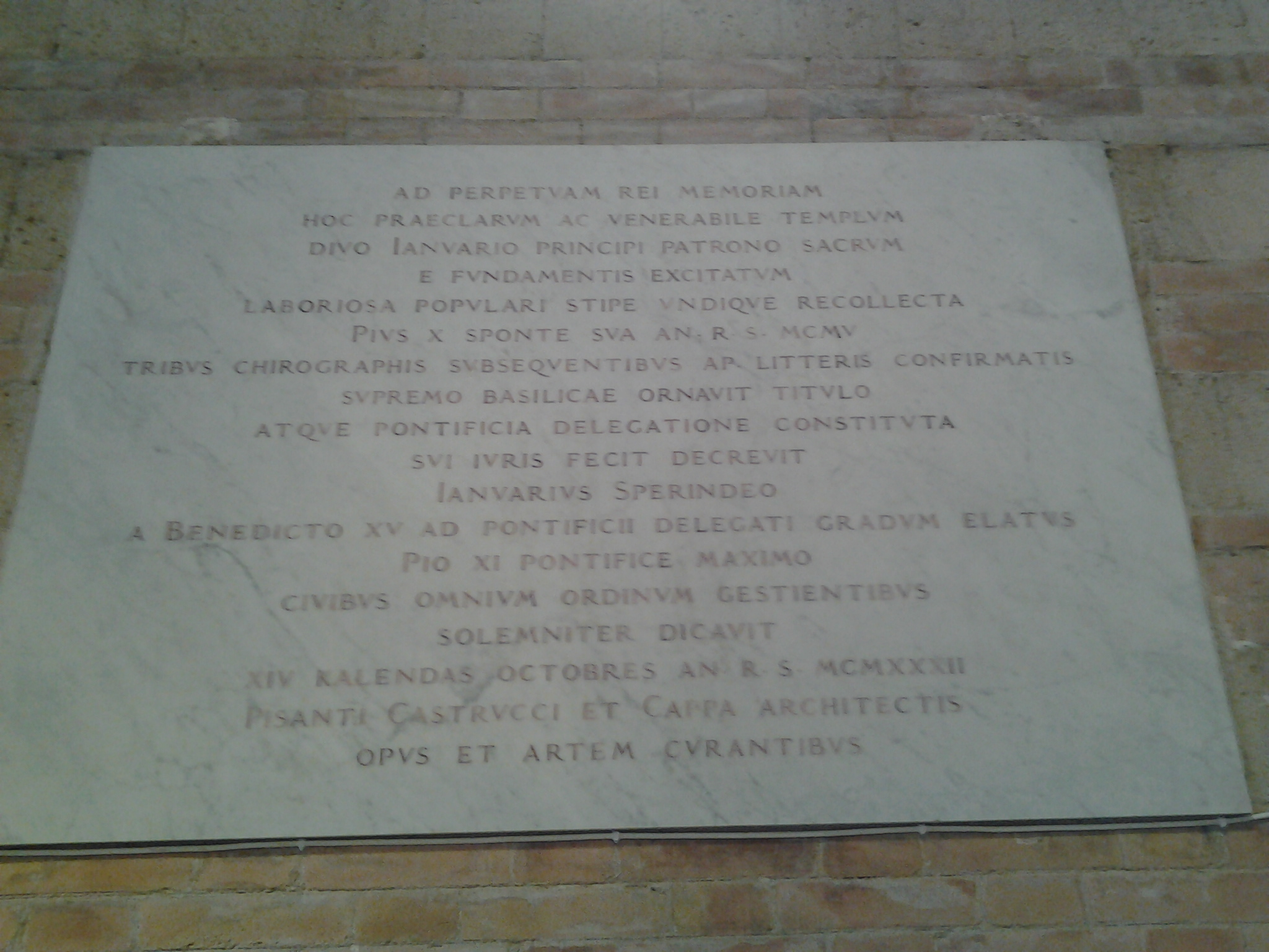 Basilica di San Gennaro ad Antignano (Napoli): lapide commemorativa di marmo bianco con iscrizioni in cinabro, del 1932, posizionata nella navata sinistra, sulla parete sinistra, al centro, riporta in latino: «AD PERPETUAM REI MEMORIAM HOC PRAECLARUM AC VENERABILE TEMPLUM DIVO IANUARIO PRINCIPI PATRONO SACRUM E FUNDAMENTIS EXCITATUM LABORIOSA POPULARI STIPE UNDIQUE RECOLLECTA PIUS X SPONTE SUA AN. R. S. MCMV TRIBUS CHIROGRAPHIS SUBSEQUENTIBUS AP LITTERIS CONFIRMATIS SUPREMO BASILICAE ORNAVIT TITULO ATQUE PONTIFICIA DELEGATIONE CONSTITUTA SUI IURIS FECIT DECREVIT IANUARIUS SPERINDEO A BENEDICTO XV AD PONTIFICII DELEGATI GRADUM ELATUS PIO XI PONTEFICE MAXIMO CIVIBUS OMNIUM ORDINUM GESTIENTIBUS SOLEMNITER DICAVIT XIV KALENDAS OCTOBRES AN. R. S. MCMXXXII PISANTI CASTRUCCI ET CAPPA ARCHITECTIS OPUS ET ARTEM CURANTIBUS»